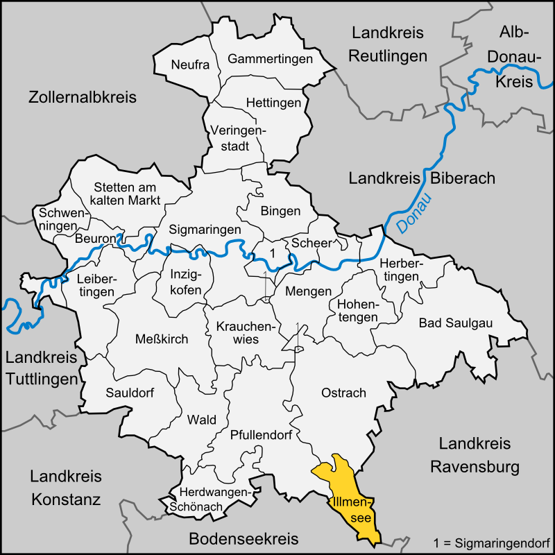 Karte der Gemeinde Illmensee im Landkreis Sigmaringen